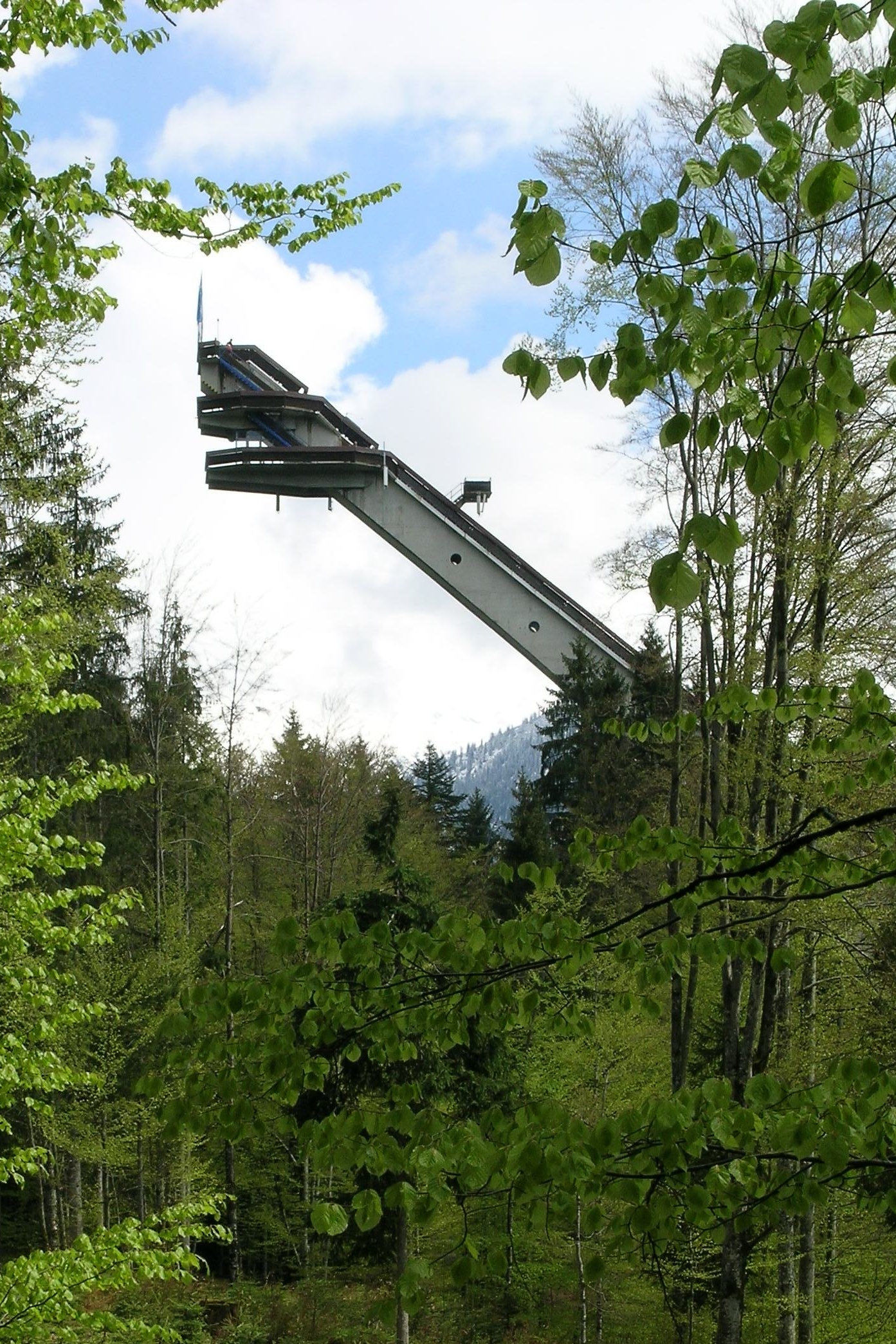 Frei stehende Heini-Klopfer-Skiflugschanze am Freibergsee bei Oberstdorf (Allgäu)